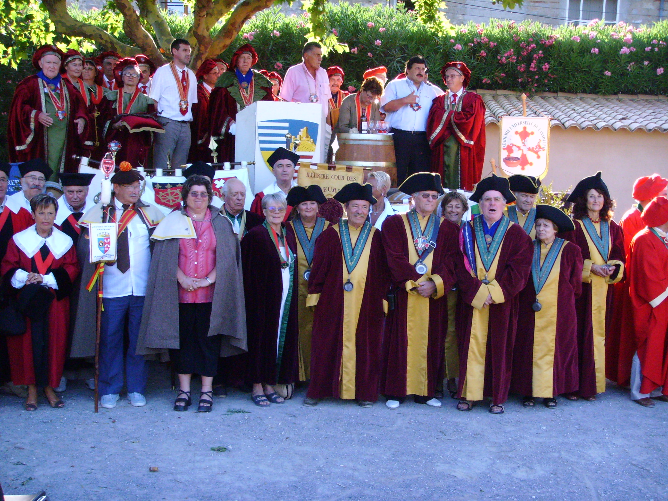 Paziols, Département Aude, France: "offical press photo" of the "dignitaries" La fete vigneronne de l'Ete, 04. aout 2006 author: Gerbil